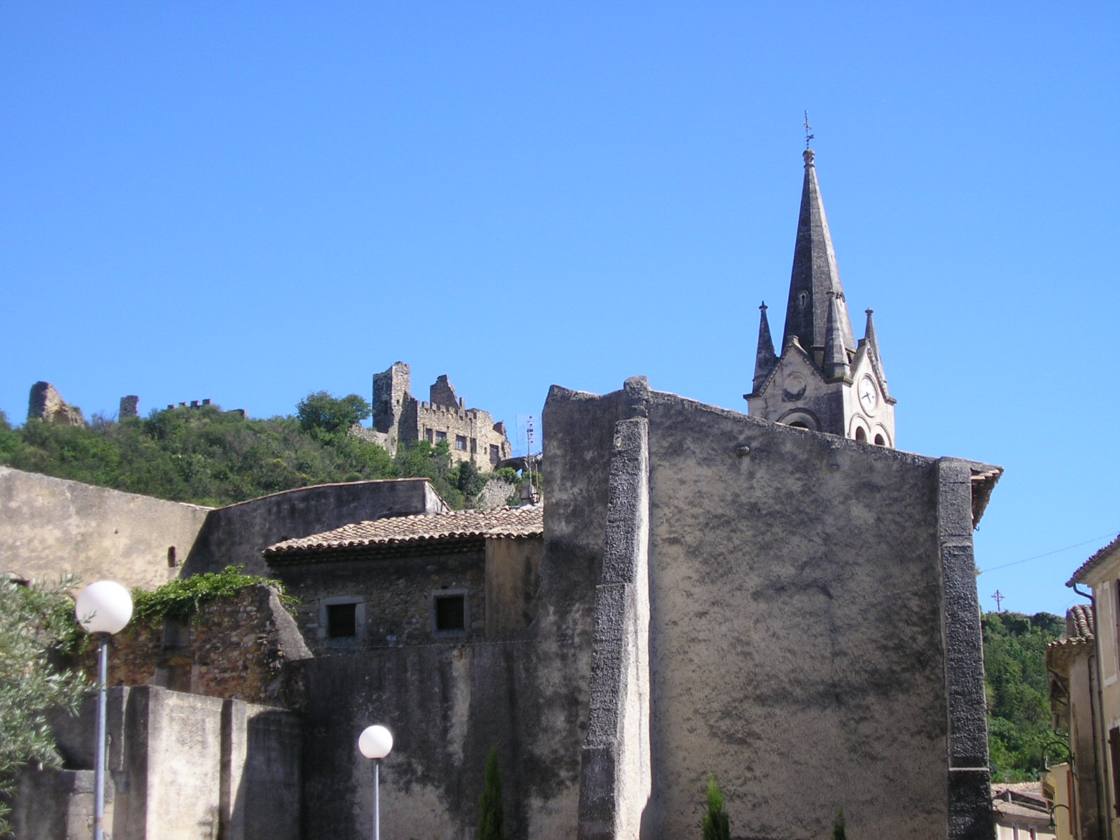 Mondragon